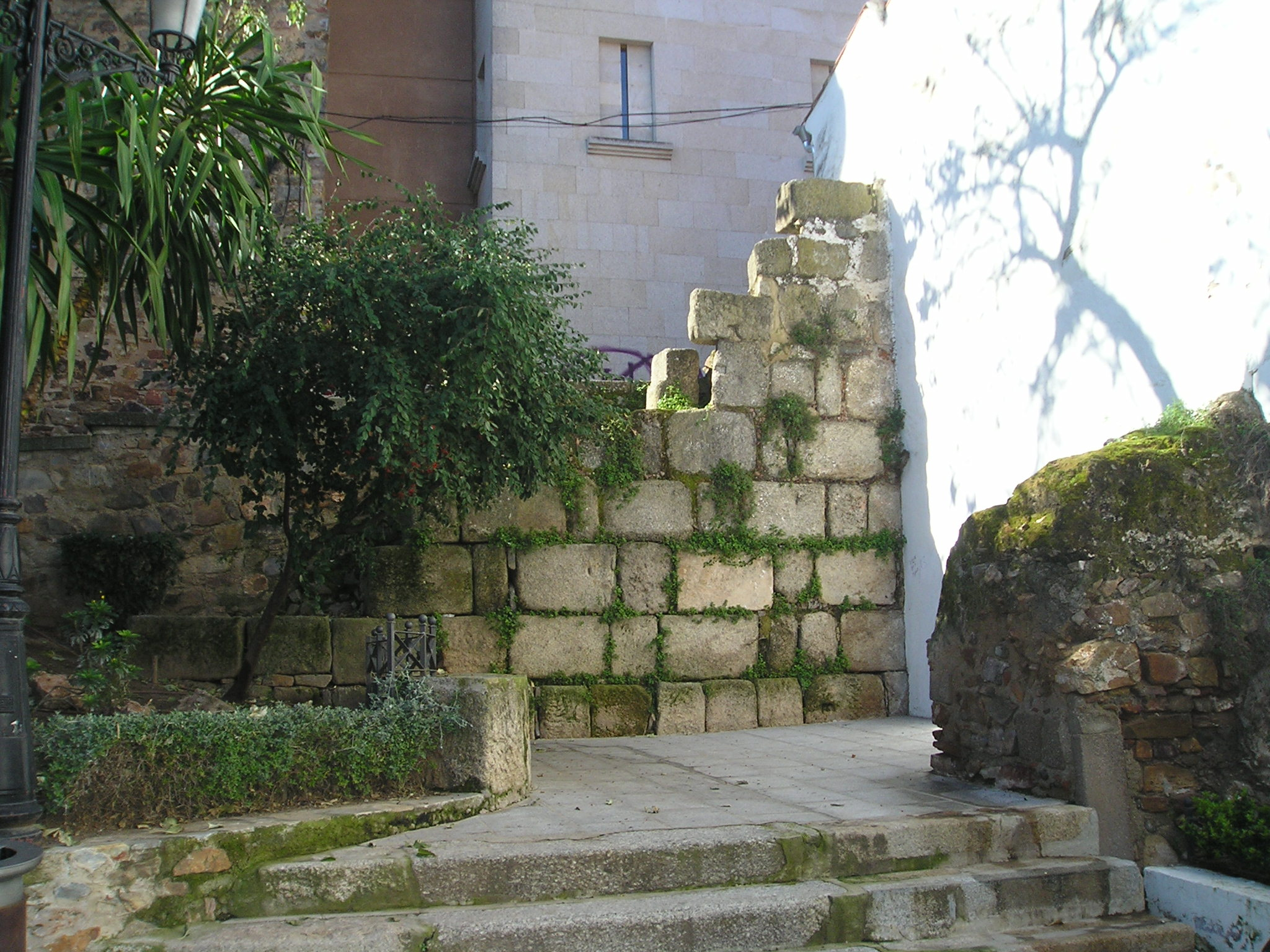 Vista frontal de los restos de la muralla romano Bajoimperial de Cáceres, en la derruida Puerta de Coria